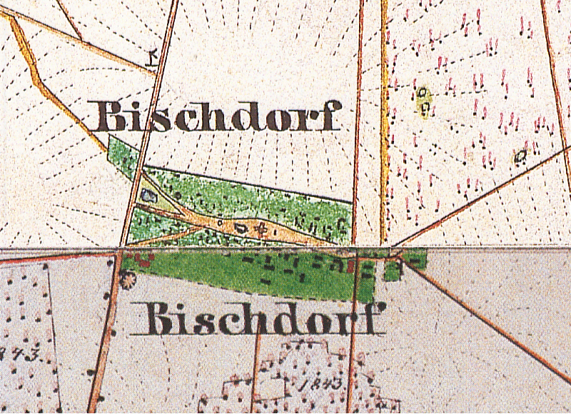 Bischdorf, Stadt Lübbenau/Spreewald, Lkr. Oberspreewald-Lausitz, Brandenburg, Ausschnitte aus den Urmesstischblätter 4149 Lübbenau/Spreewald von 1846 und 4249 Calau von 1846 kombiniert